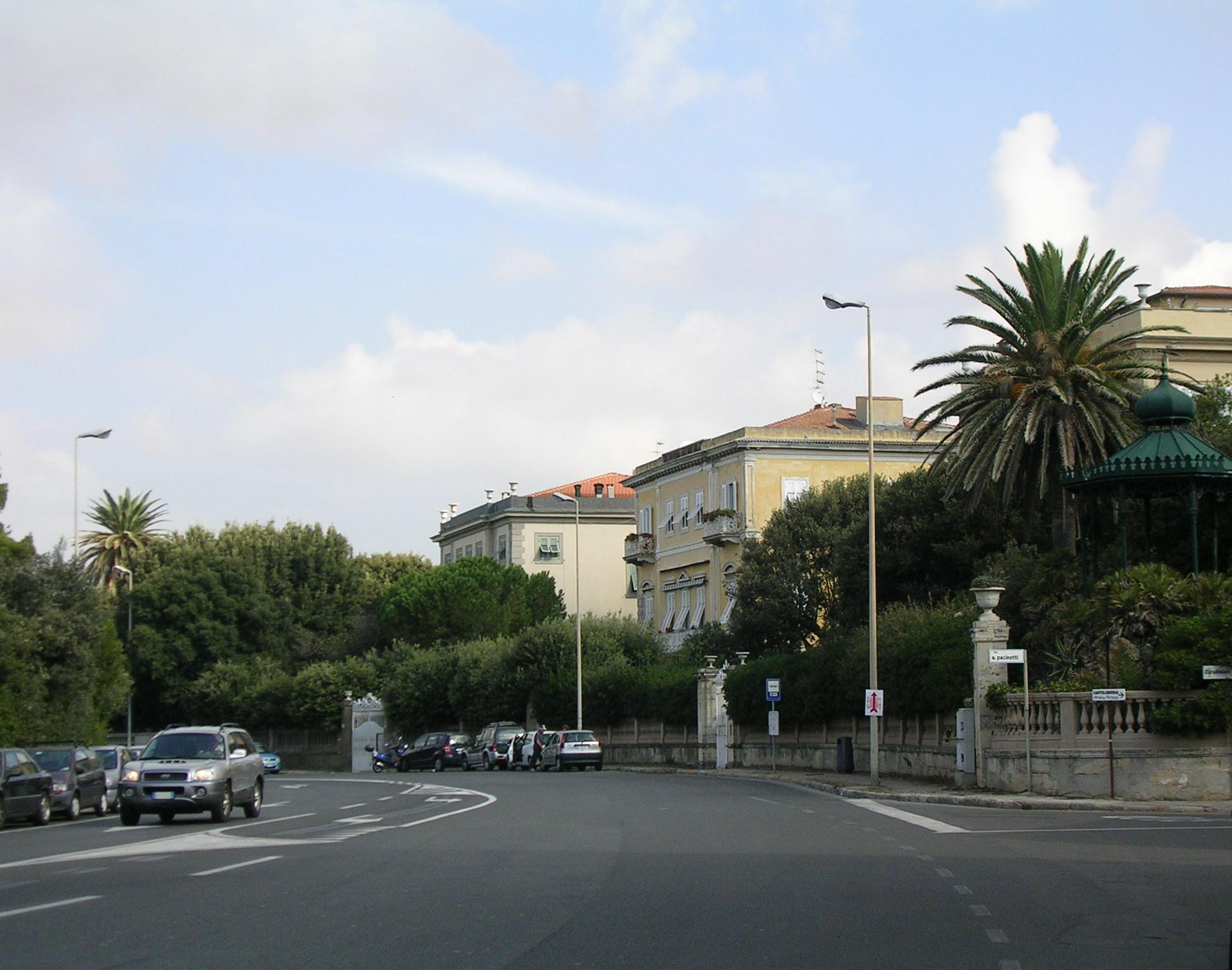 Livorno: i villini ottocenteschi del quartiere di Ardenza.